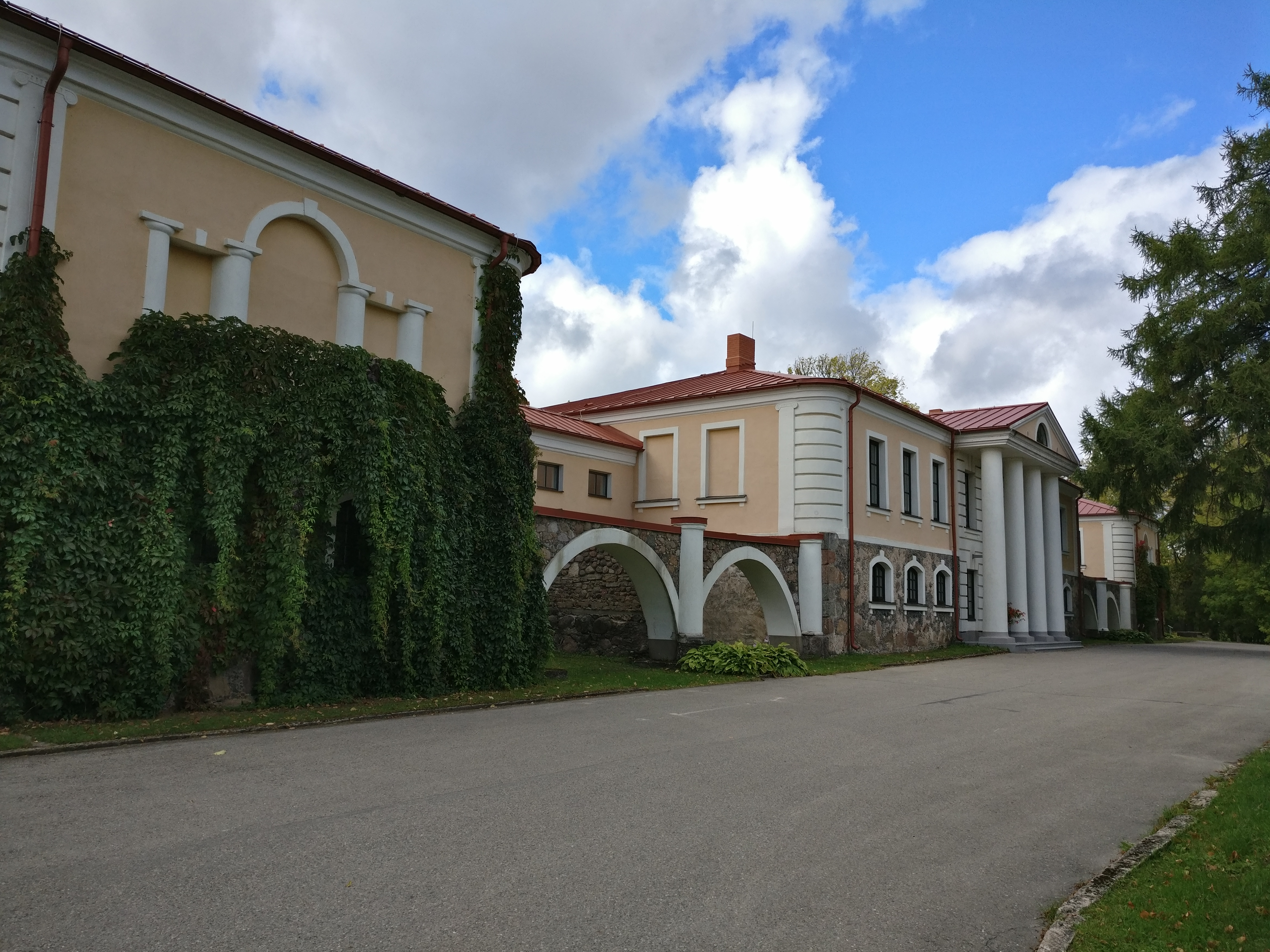 Pils, Inešu pagasts